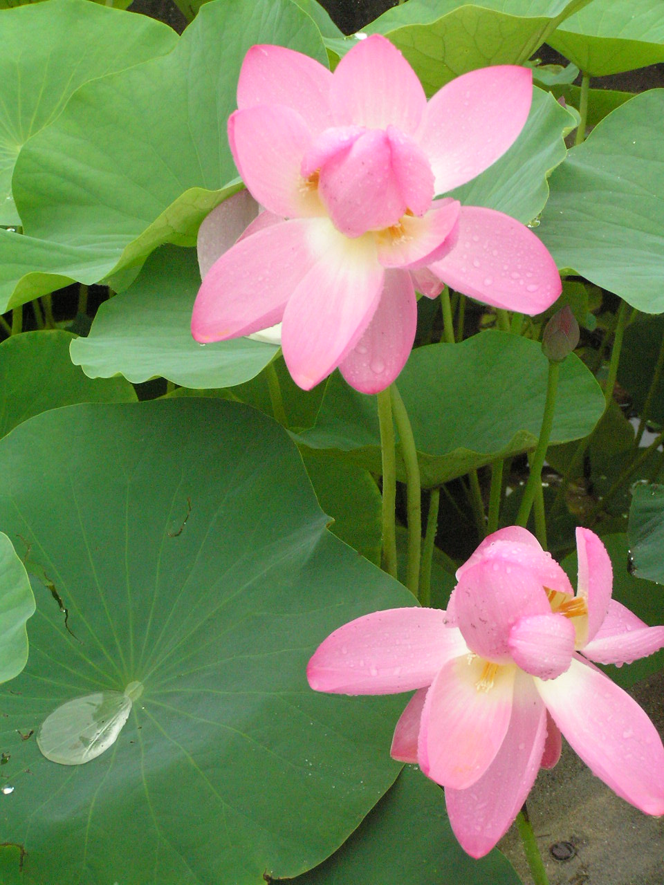 大賀ハス 【おぉたむ すねィく探検隊】写真部門 担当 大原佳苗 ～photo by Autumn Snake